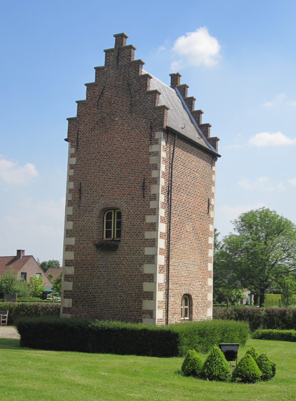 'Goed te Nieuwenhove' in Waregem, neerhof van het voormalige kasteel van Nieuwenhove: Duiventoren